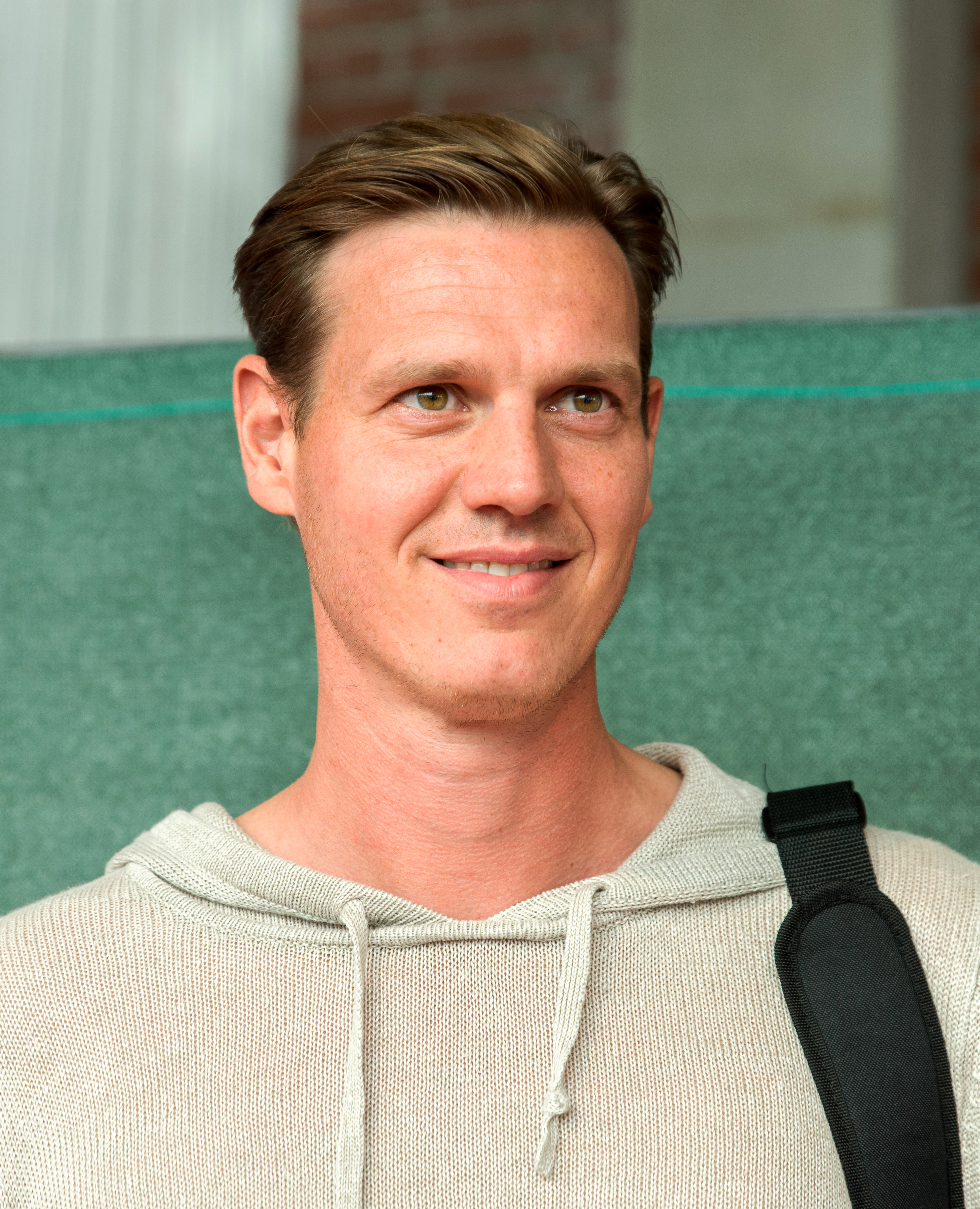 Tim Borowski beim Tag der Legenden 2016